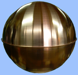 Element wykonany metodą wyoblania ręcznego Autor: --Pawel S 00:41, 20 kwi 2007 (CEST)